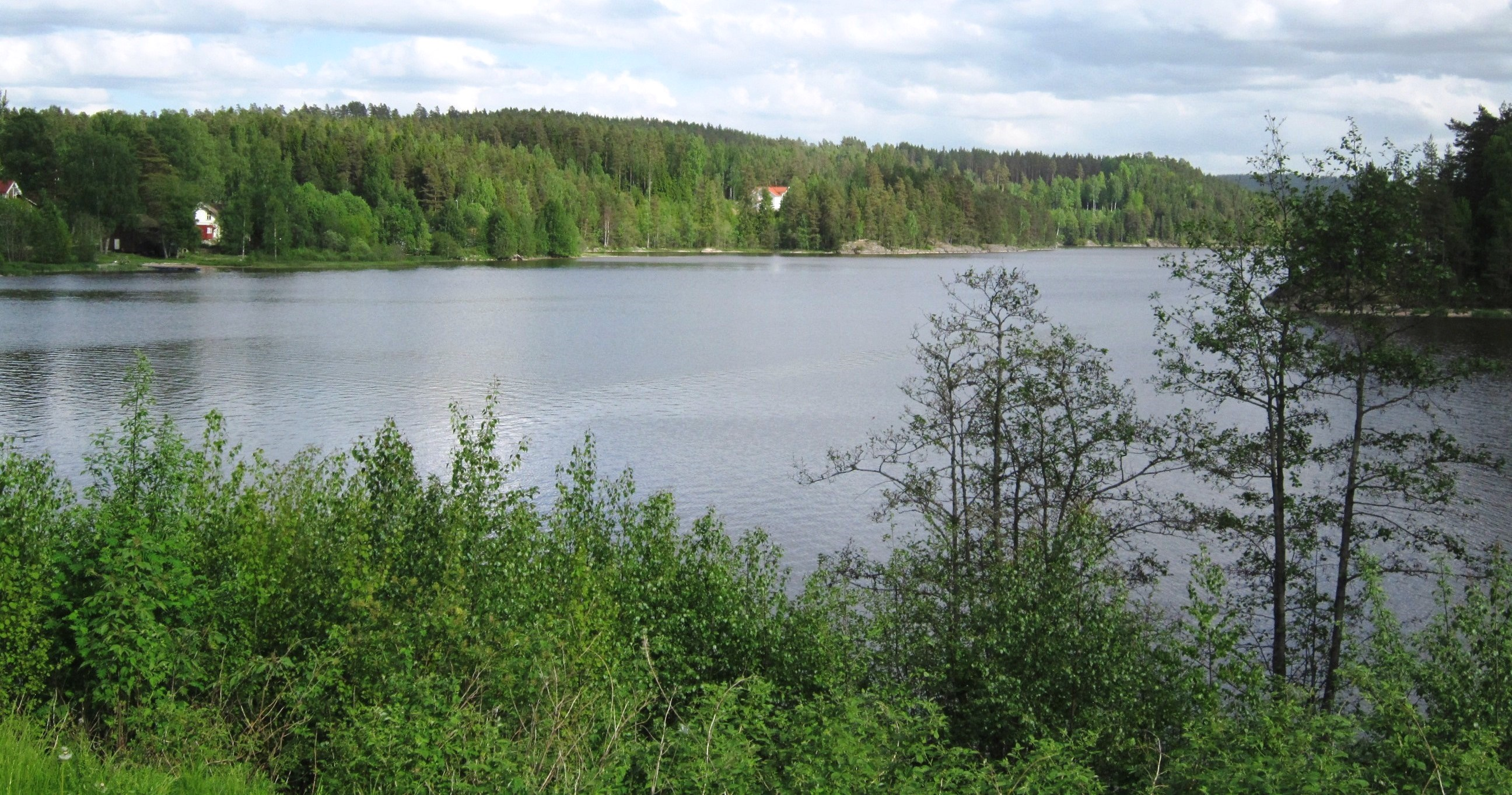 Rødenessjøen ved Kroksund